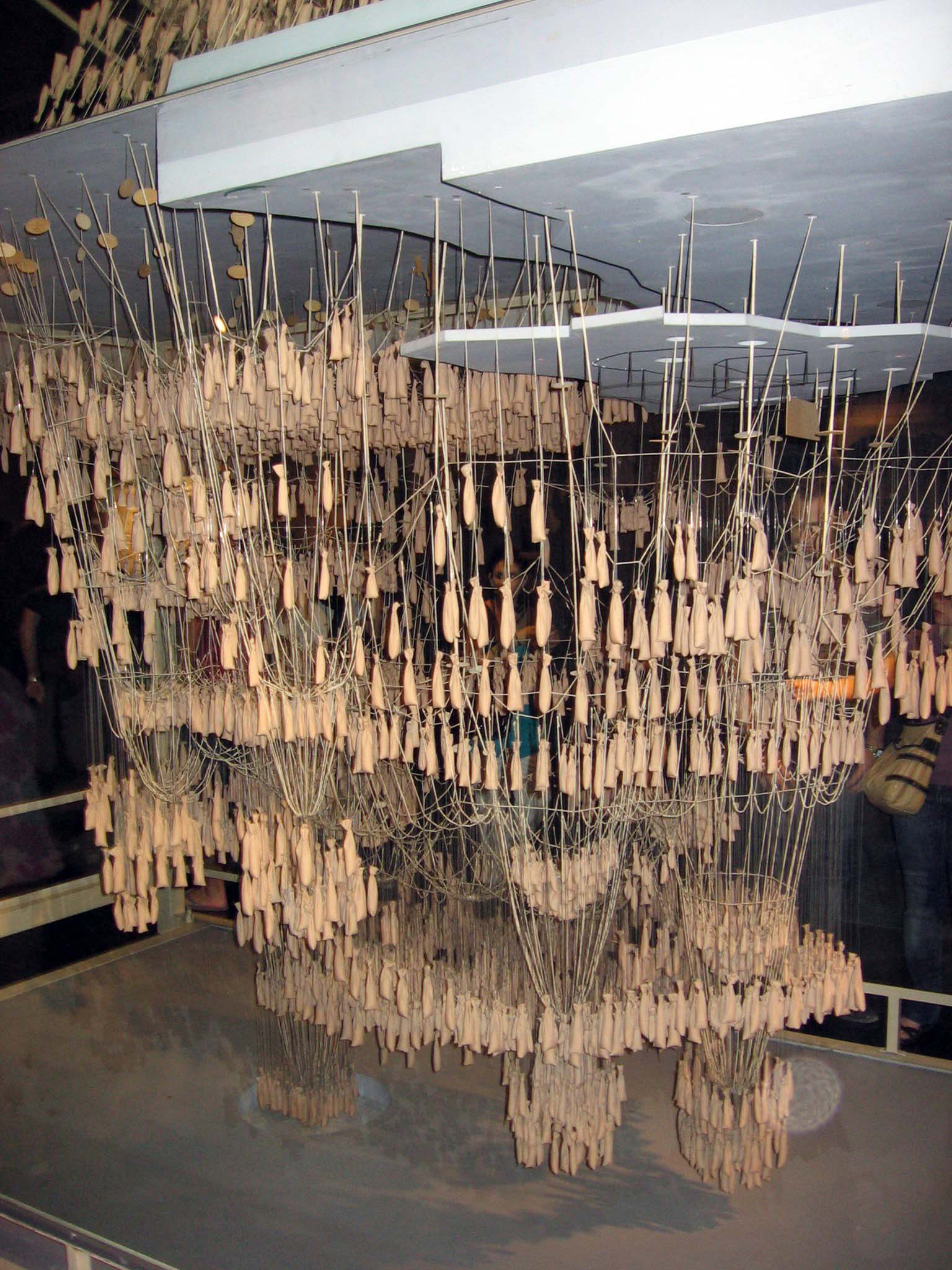 Maqueta polifunicular, Antoni Gaudí, Museo de la Sagrada Familia